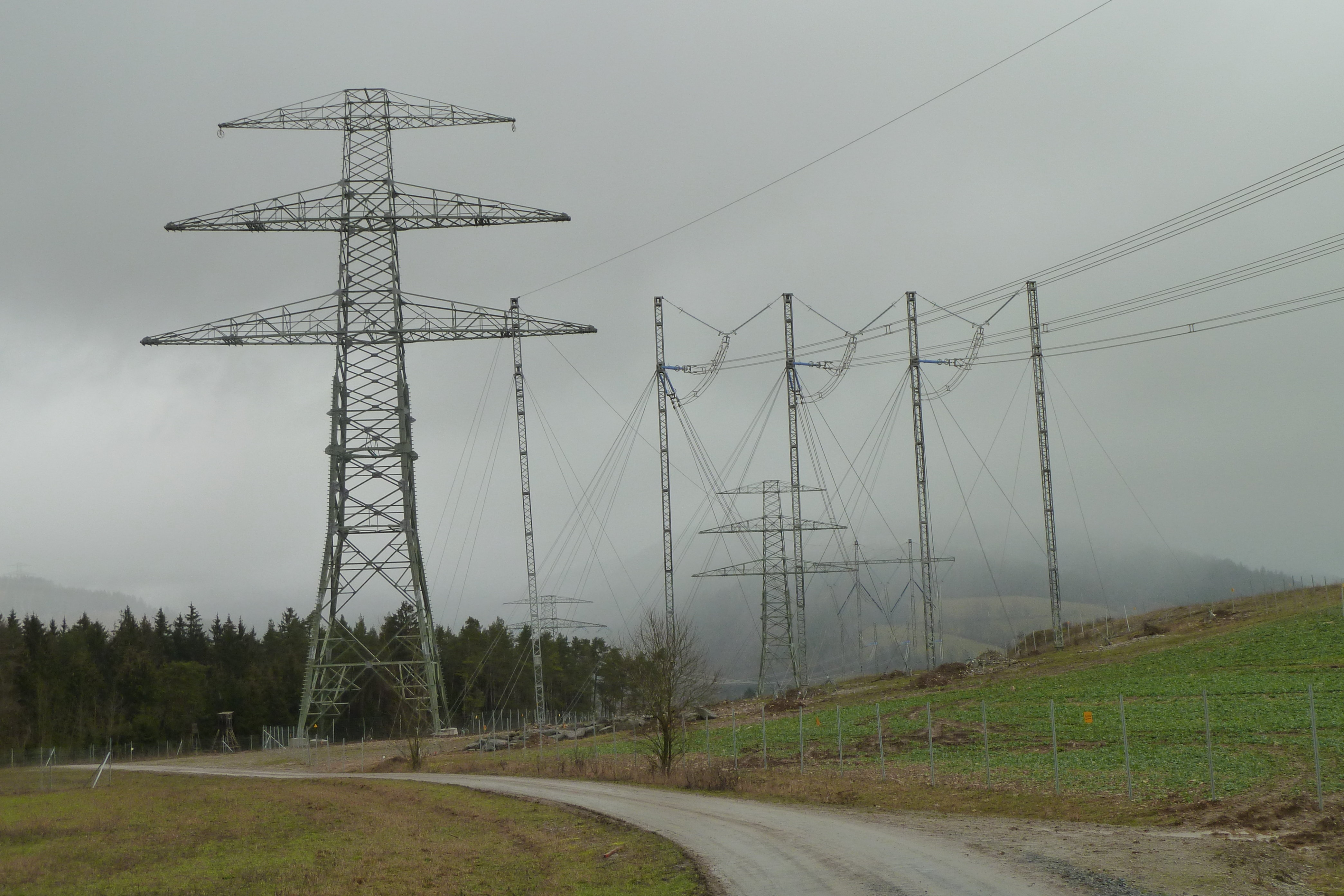 Provisorische 380-kV-Freileitung im Bereich Theuern auf dem Galgenberg